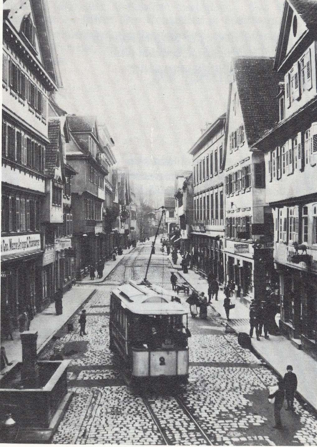 Seitenlinie der Heilbronner Straßenbahn in der Sülmer Straße 1903